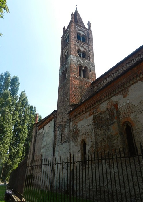 Buttigliera Alta - Campanile dell'Abbazia di S. Antonio di Ranverso